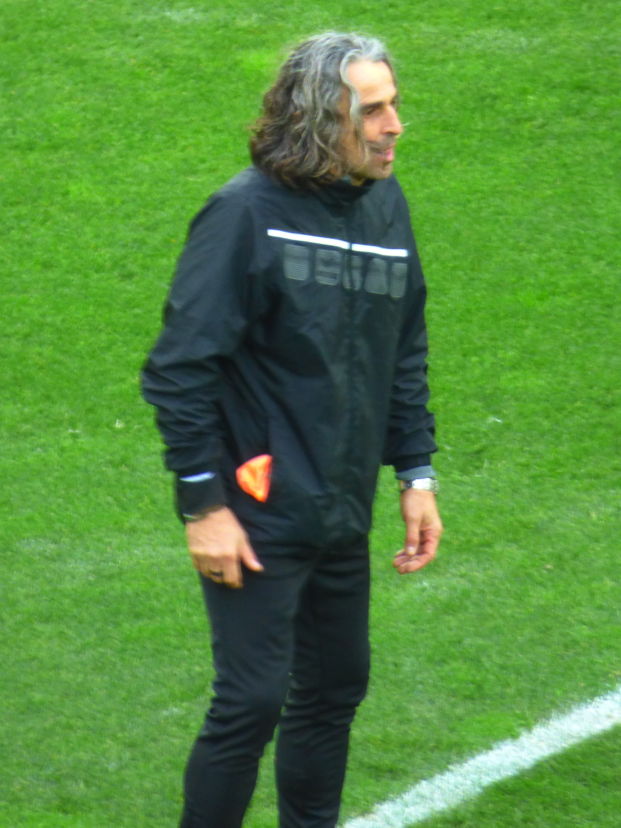 Jean-Philippe Faure avant le match Lens / Niort, le 21 décembre 2019, comptant pour la dix-neuvième journée du championnat de France de football de Ligue 2 2019-2020.